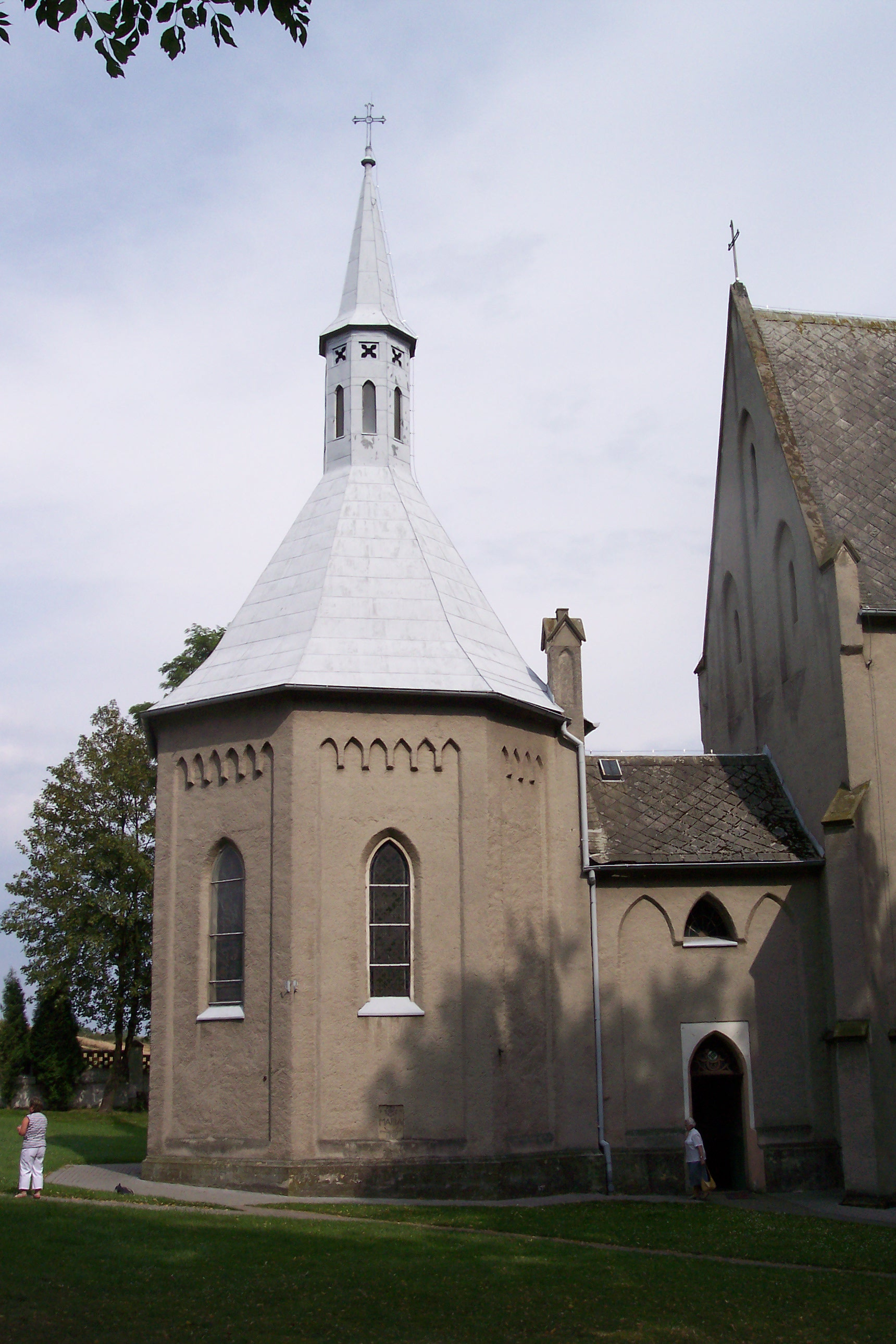 Kościół pątniczy p.w. Nawiedzenia NMP w Ujeździe